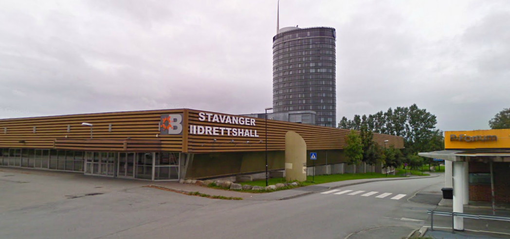 Stavanger Idrettshall